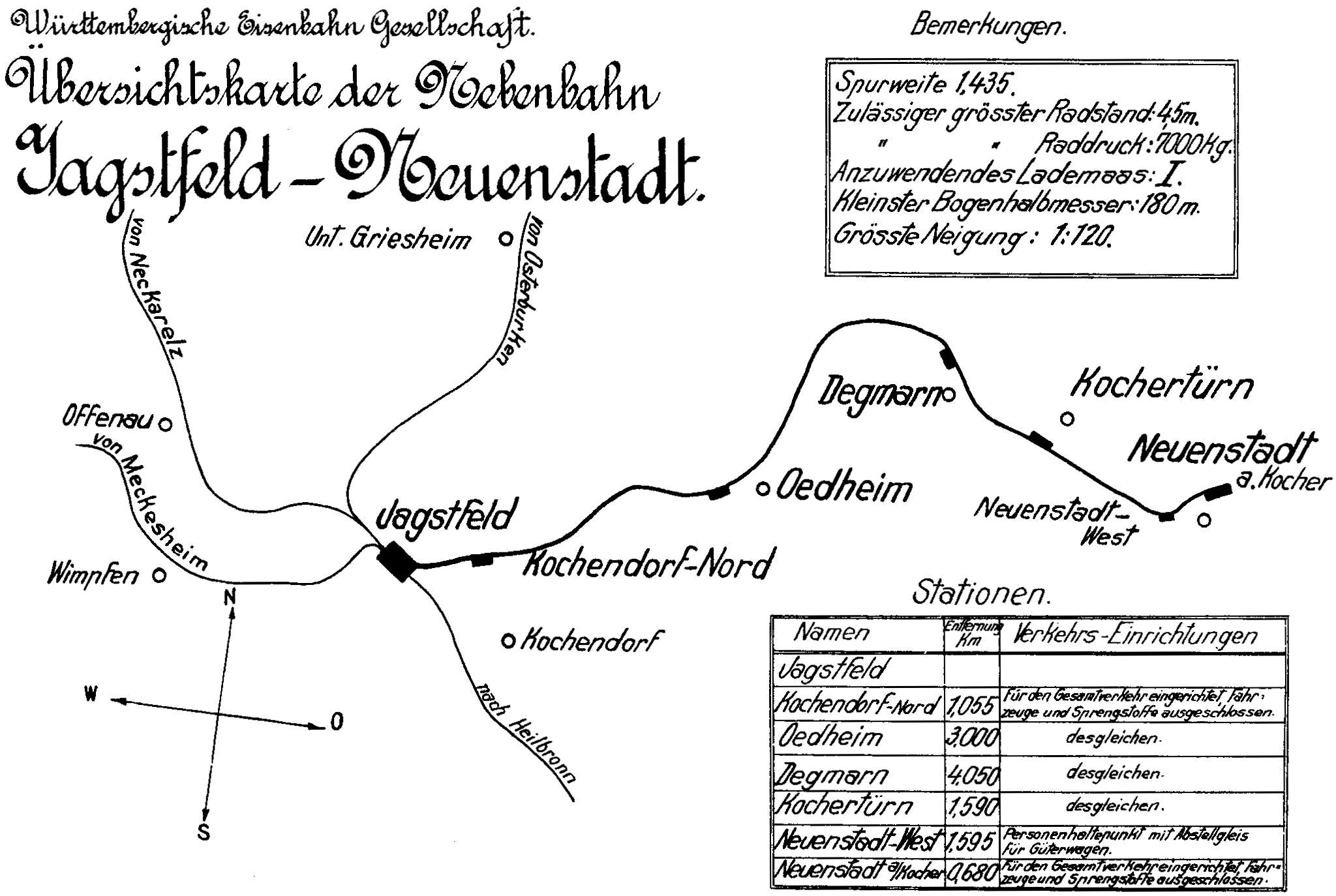 Entwurfsskizze der Unteren Kochertalbahn.